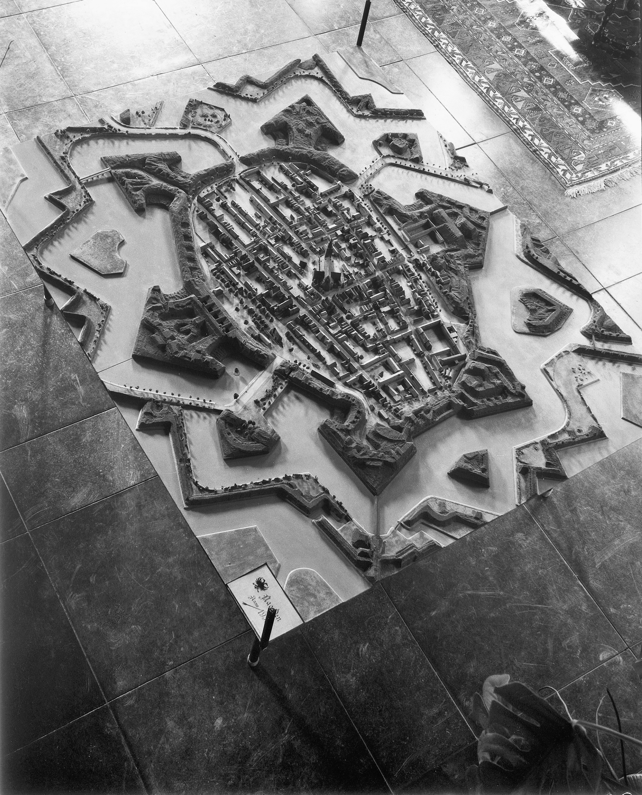 maquette van de stad bevindt zich op het Stadhuis